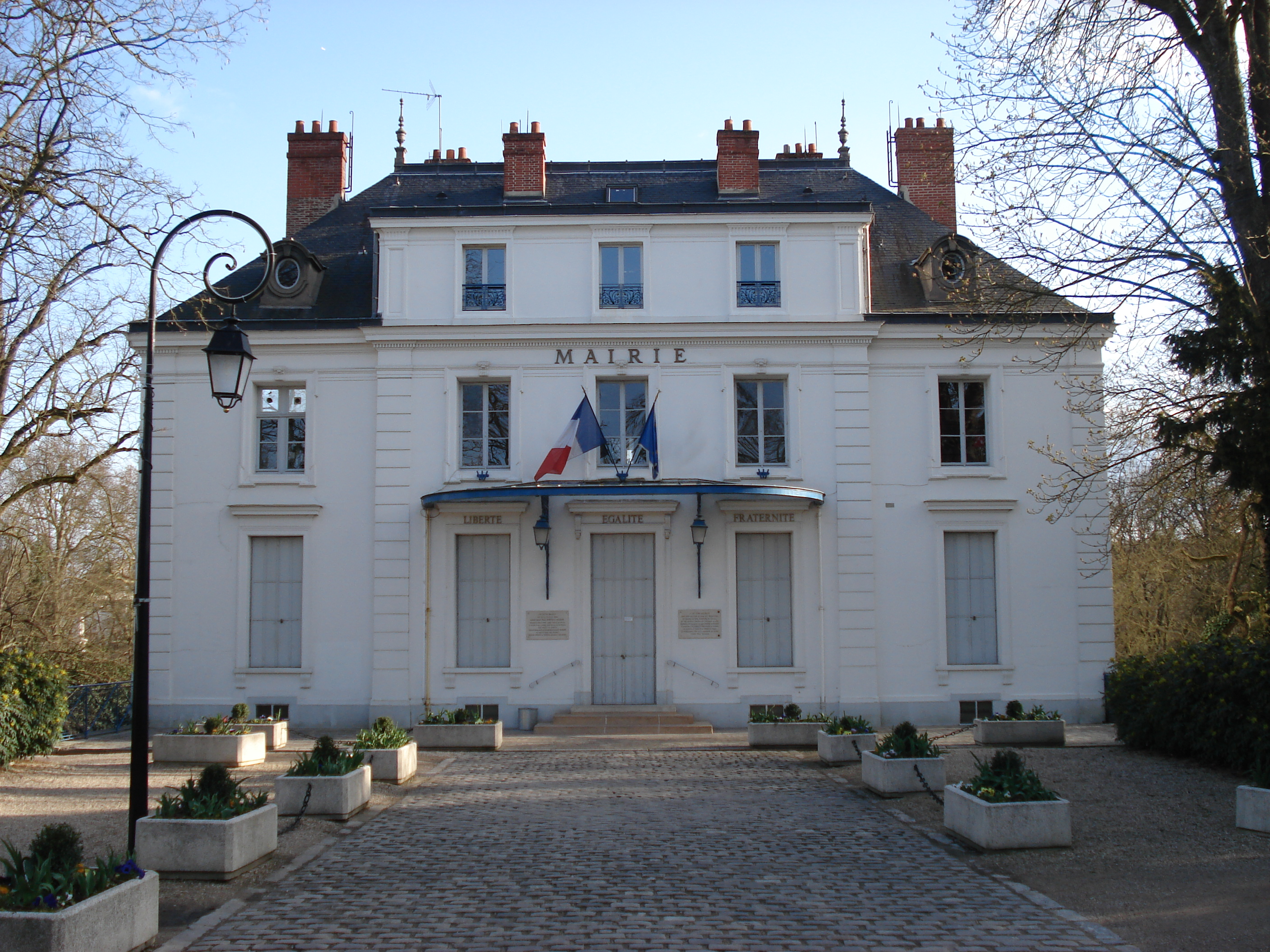 Mairie de Boussy-Saint-Antoine - façade